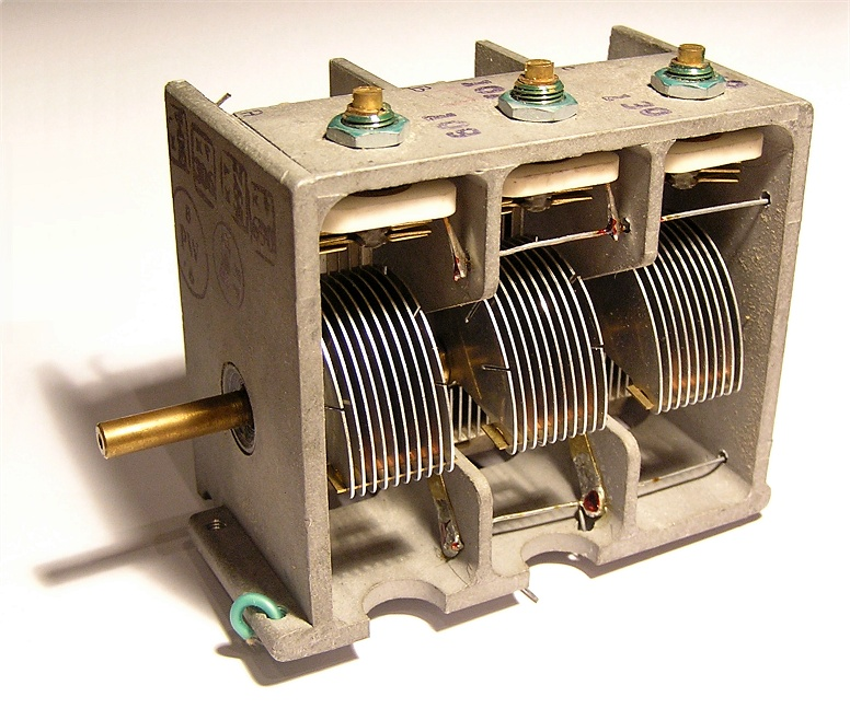 Zdjęcie do artykułu Kondensator strojeniowy